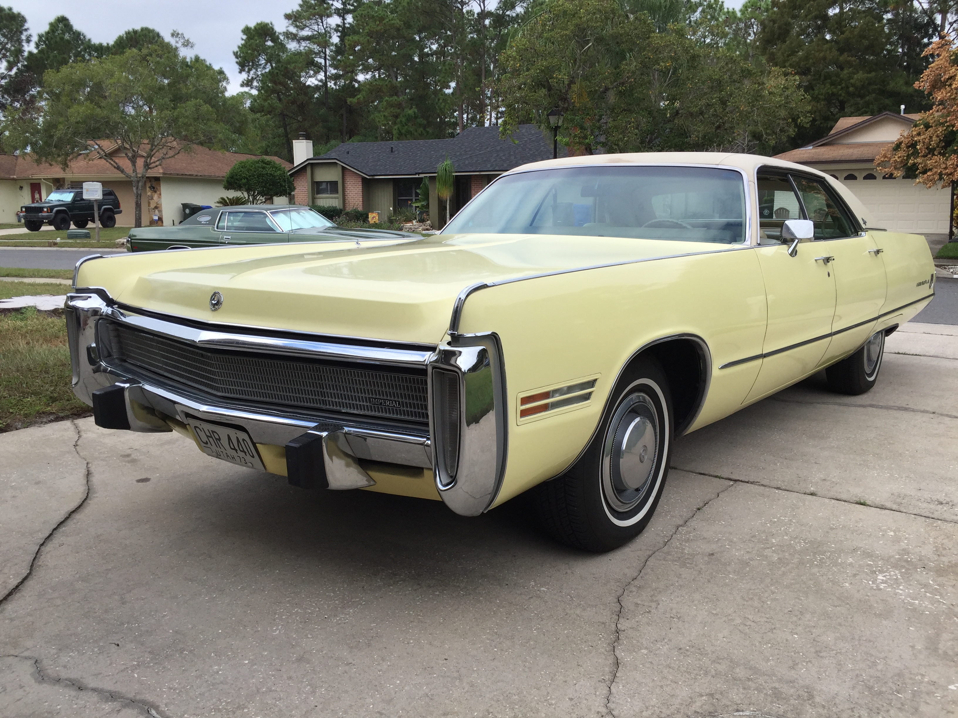 1973 Imperial Le Baron from Mauro Pietro